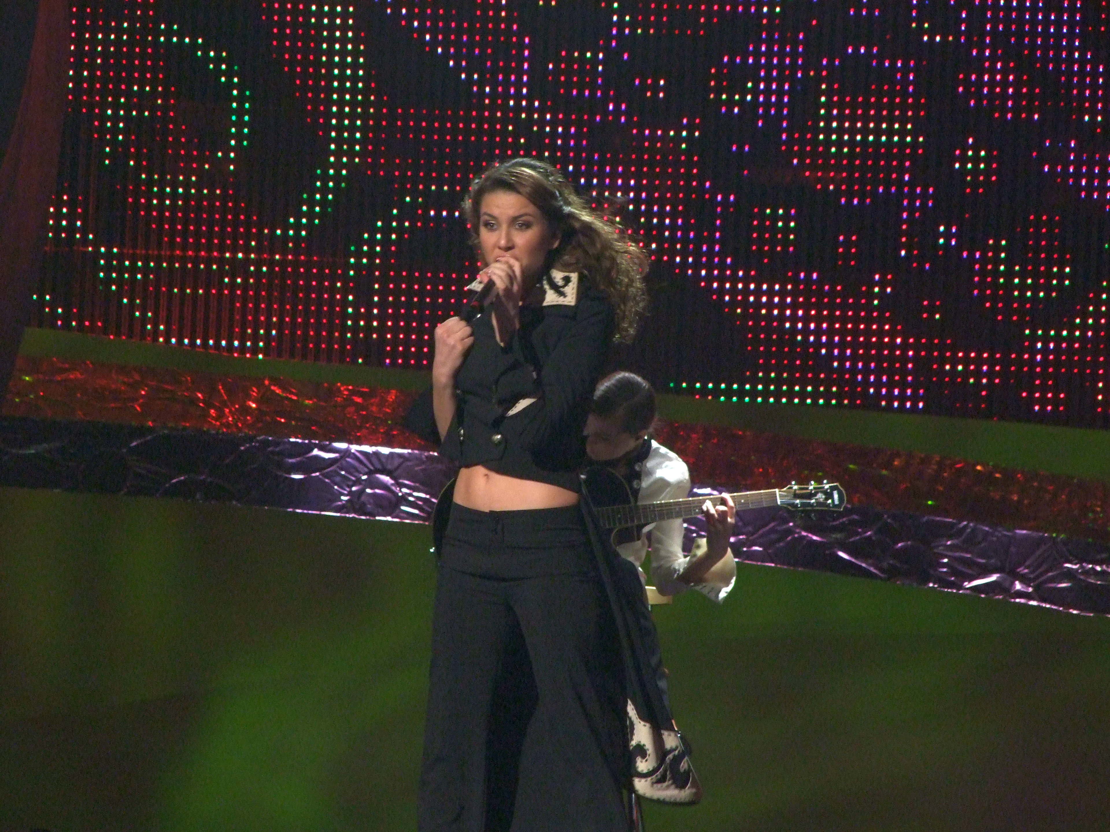 Final Eurovision 2008